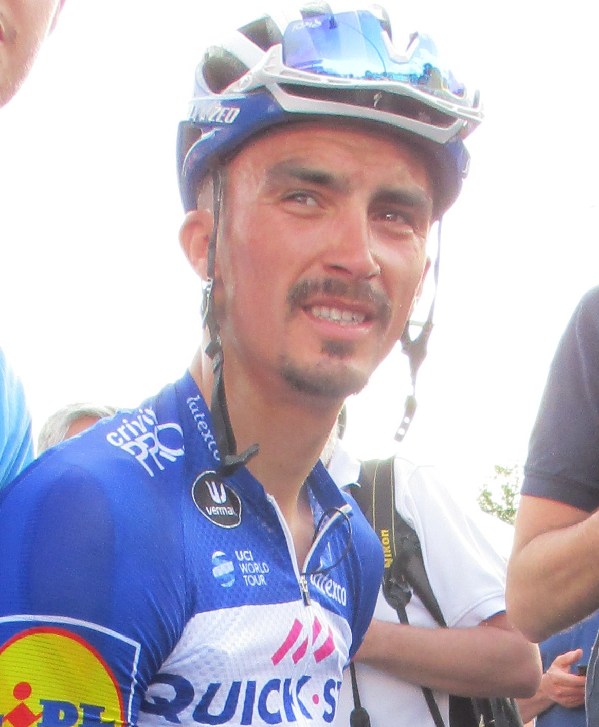 Finish van Luik-Bastenaken-Luik 2018 in Ans.